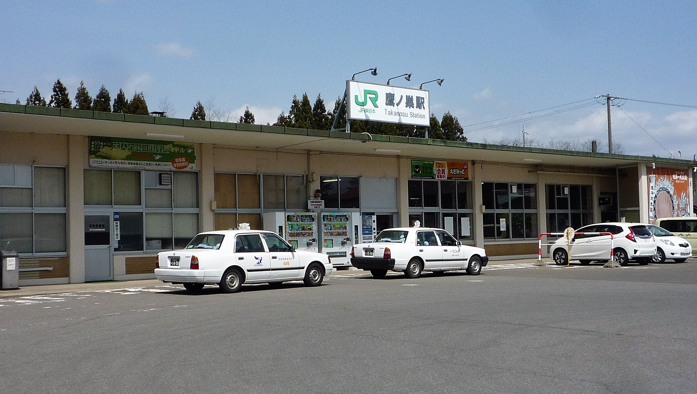 JR鷹ノ巣駅（秋田県北秋田市）